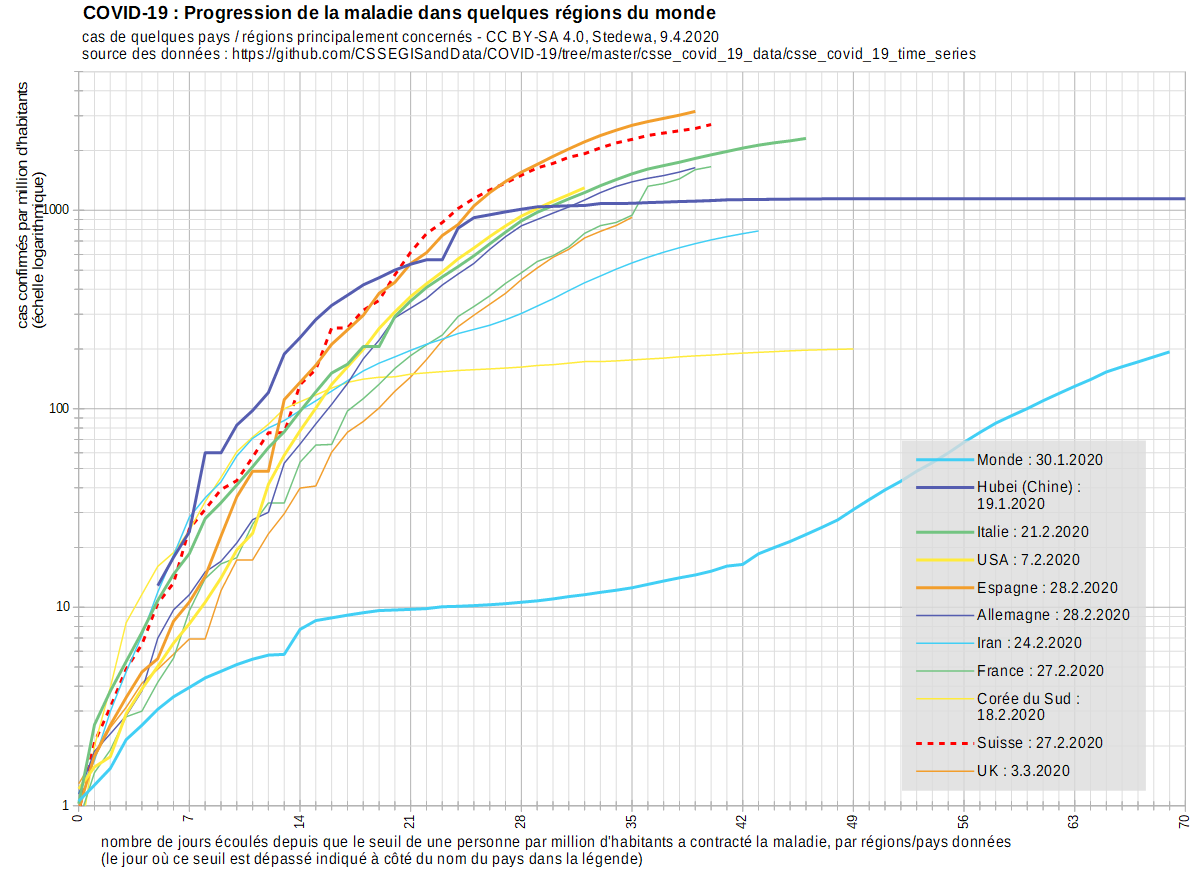 Courbes des cas confirmés de l'évolution de la pandémie Covid-19 dans les différentes régions du monde les plus touchées, les courbes sont données par million d'habitants sur une échelle logarithmique, le début de chaque courbe correspond au jour où le seuil dépasse un cas parmi un million d'habitants